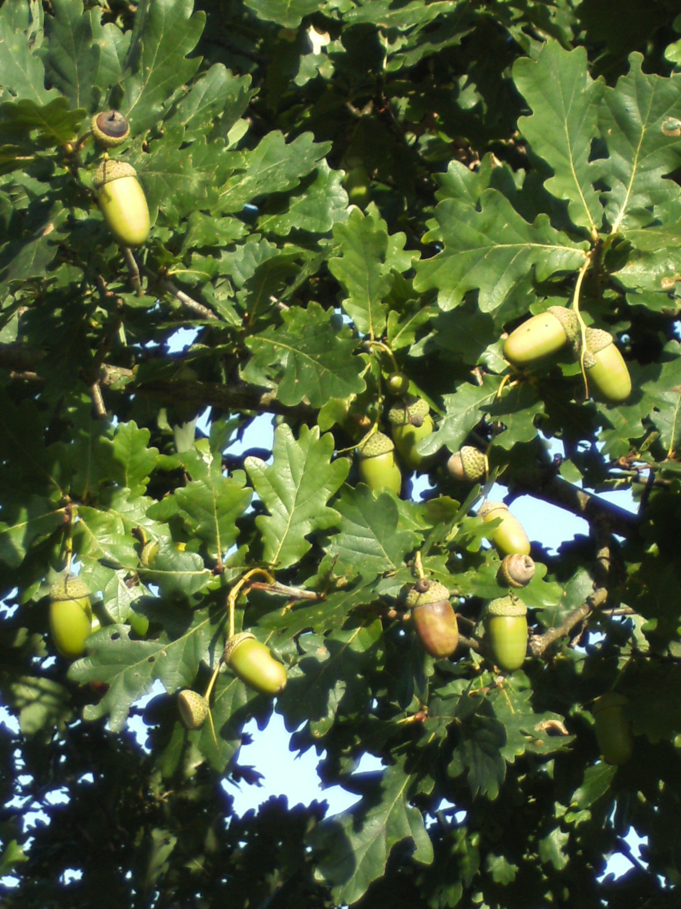 Zomereik (Quercus robur) vrucht en blad. Jonge boom